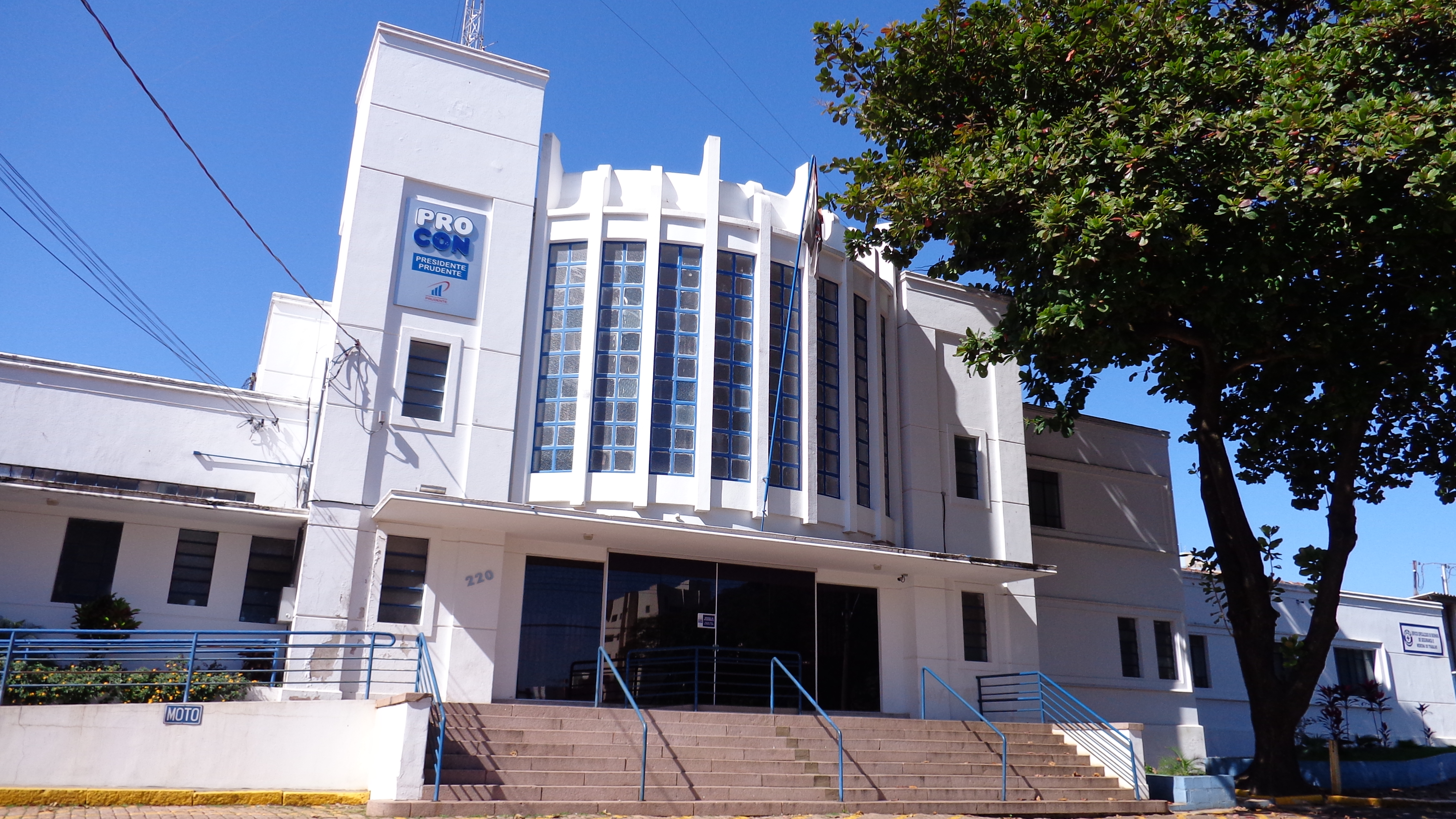 Atual Procon